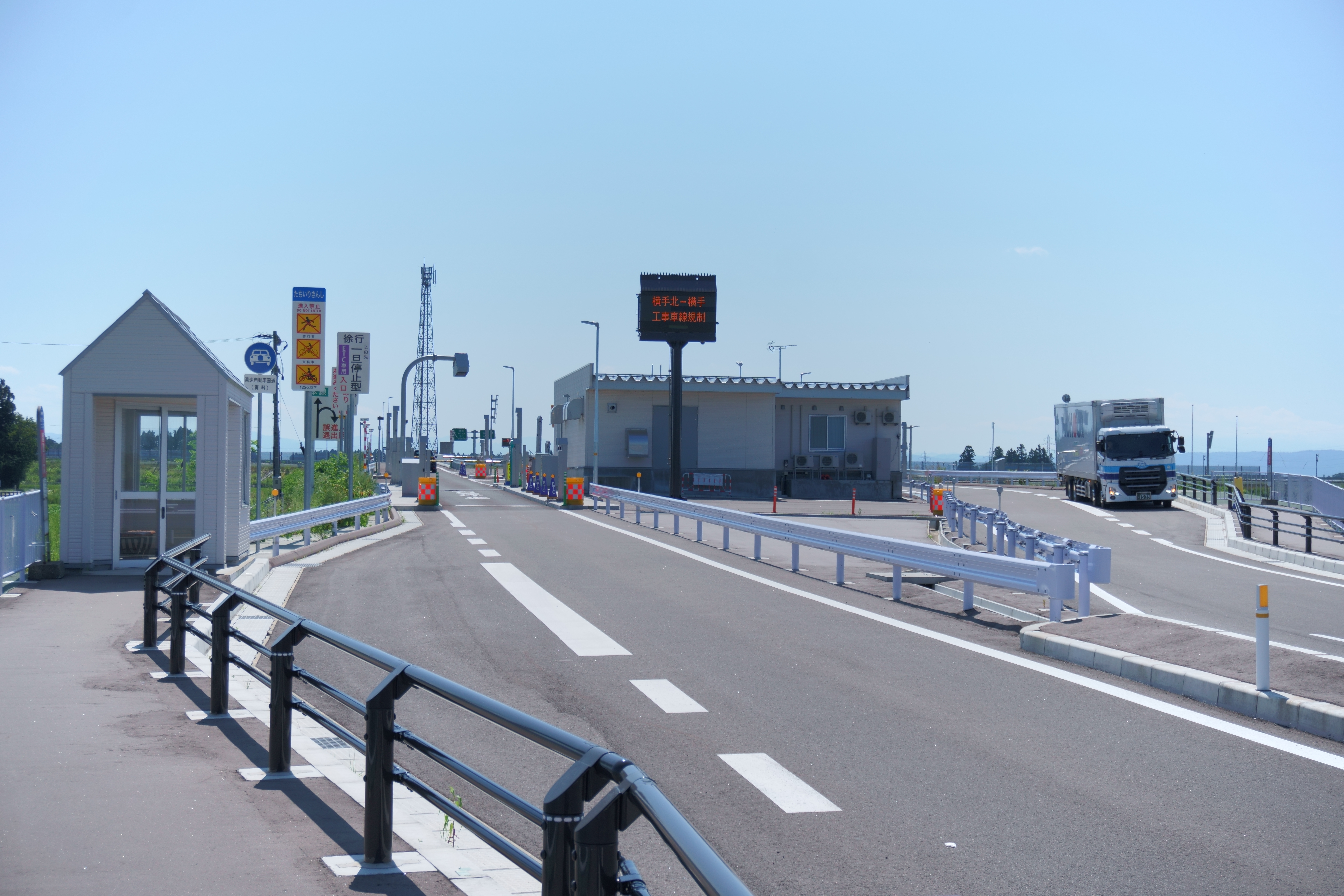 秋田自動車道・横手北スマートインターチェンジ（秋田県横手市）